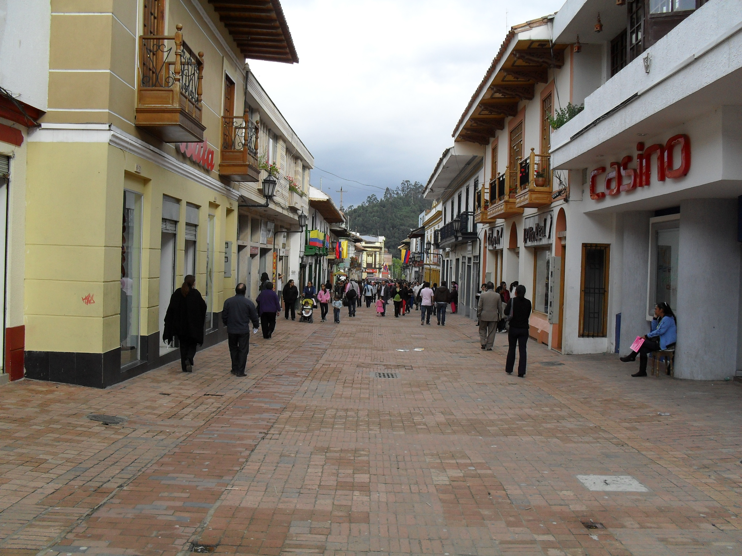 Via peatonal en la ciudad de Chiquinquirá, Boyacá, Colombia